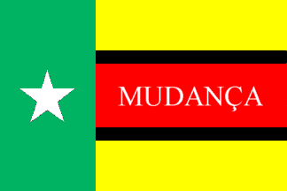 Flagge der osttimoresischen Partei Frente-Mudança nach Bild von Internet-Blog in der Version von 2015